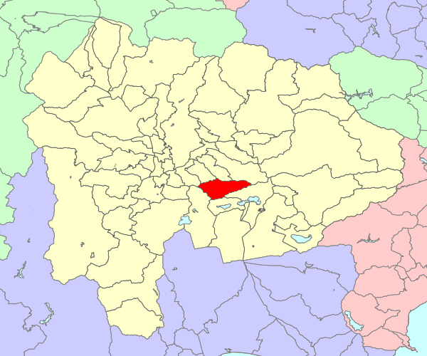 山梨県東八代郡芦川村の位置画像。